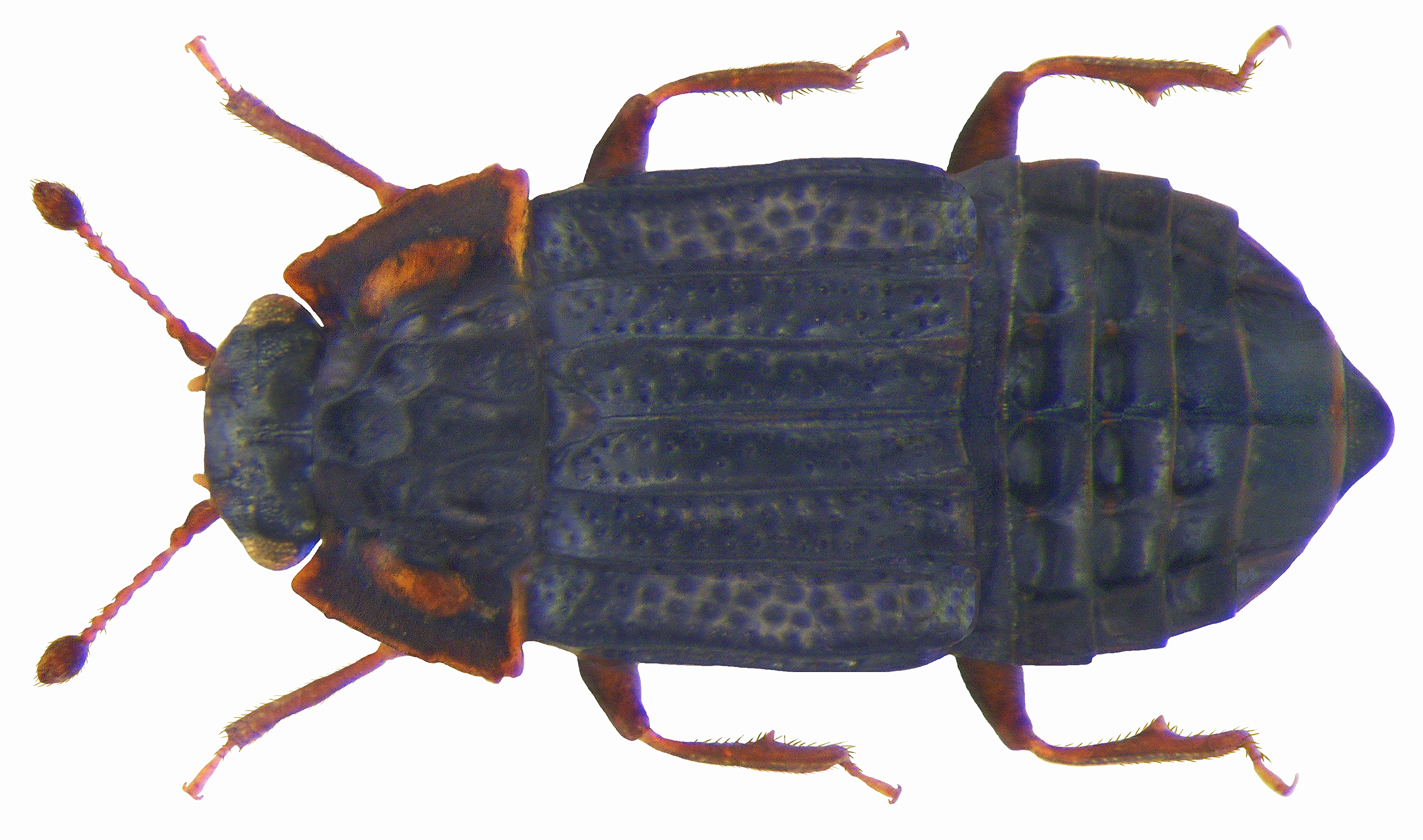 Familie: Micropeplidae Grösse: 2,5-2,8 mm Verbreitung: mittleres und südliches Mitteleuropa, selten Ökologie: in faulenden Pflanzenstoffen Fundort: Germania, Thüringen, Eisenach leg.det. W.Apfel, 1988 Foto: U.Schmidt, 2009